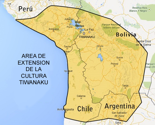 Cultura Tiwanaku